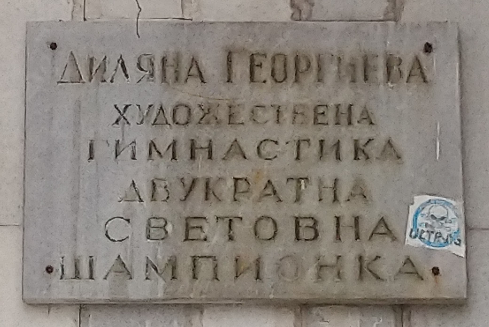 Паметна плоча на художествената гимнастичка Диляна Георгиева на фасадата на спортна зала "Васил Левски", Пазарджик